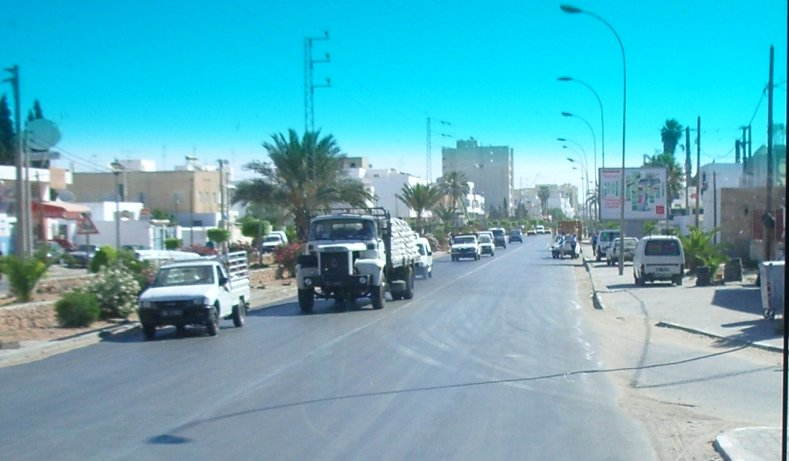 centre de Sfax